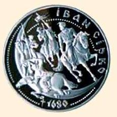 Монета гривні, на якій зображено І.Сірка: Ювілейна монета НБУ — Іван Сірко